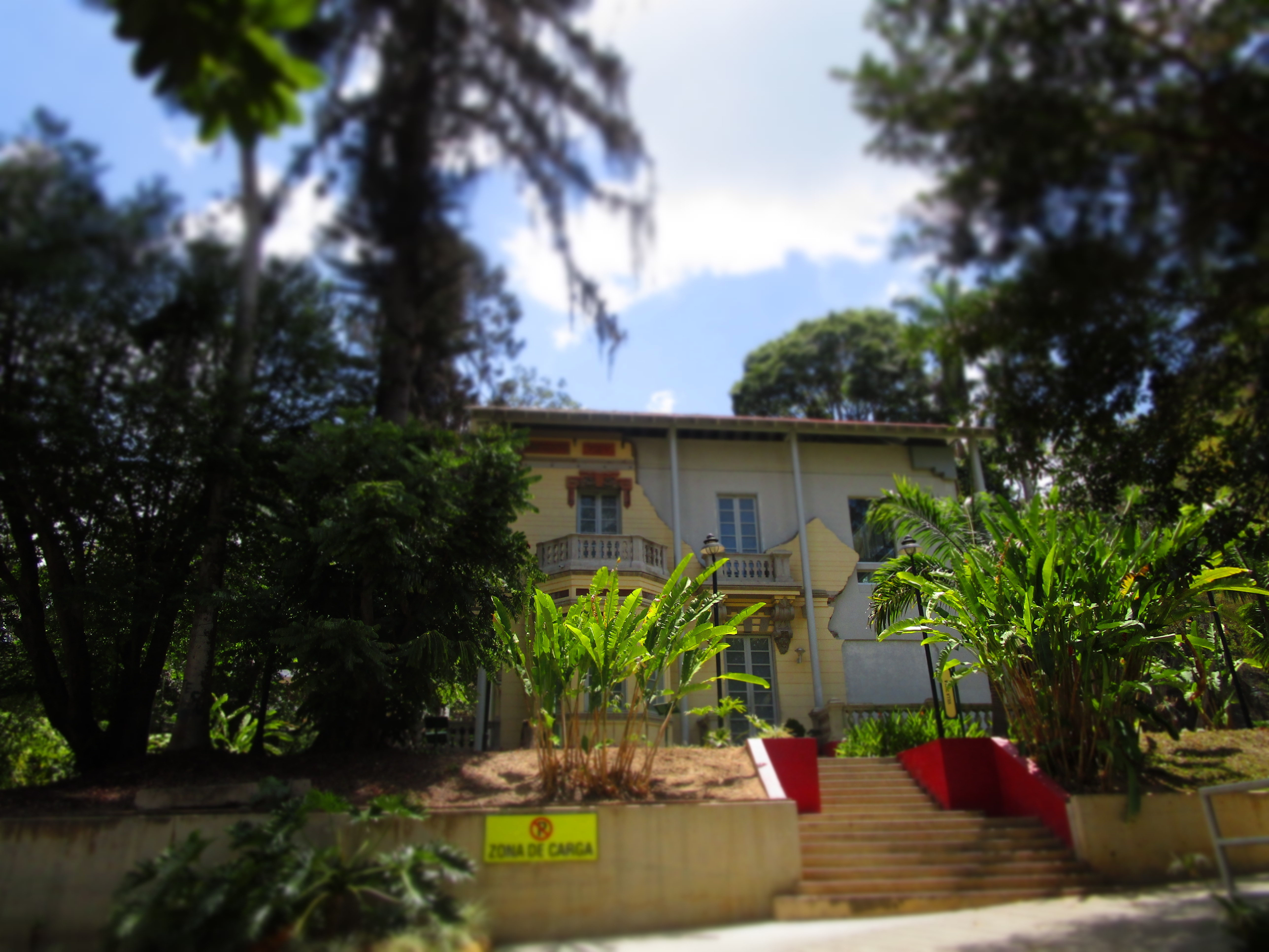 Villa Teola en Los Teques 2019